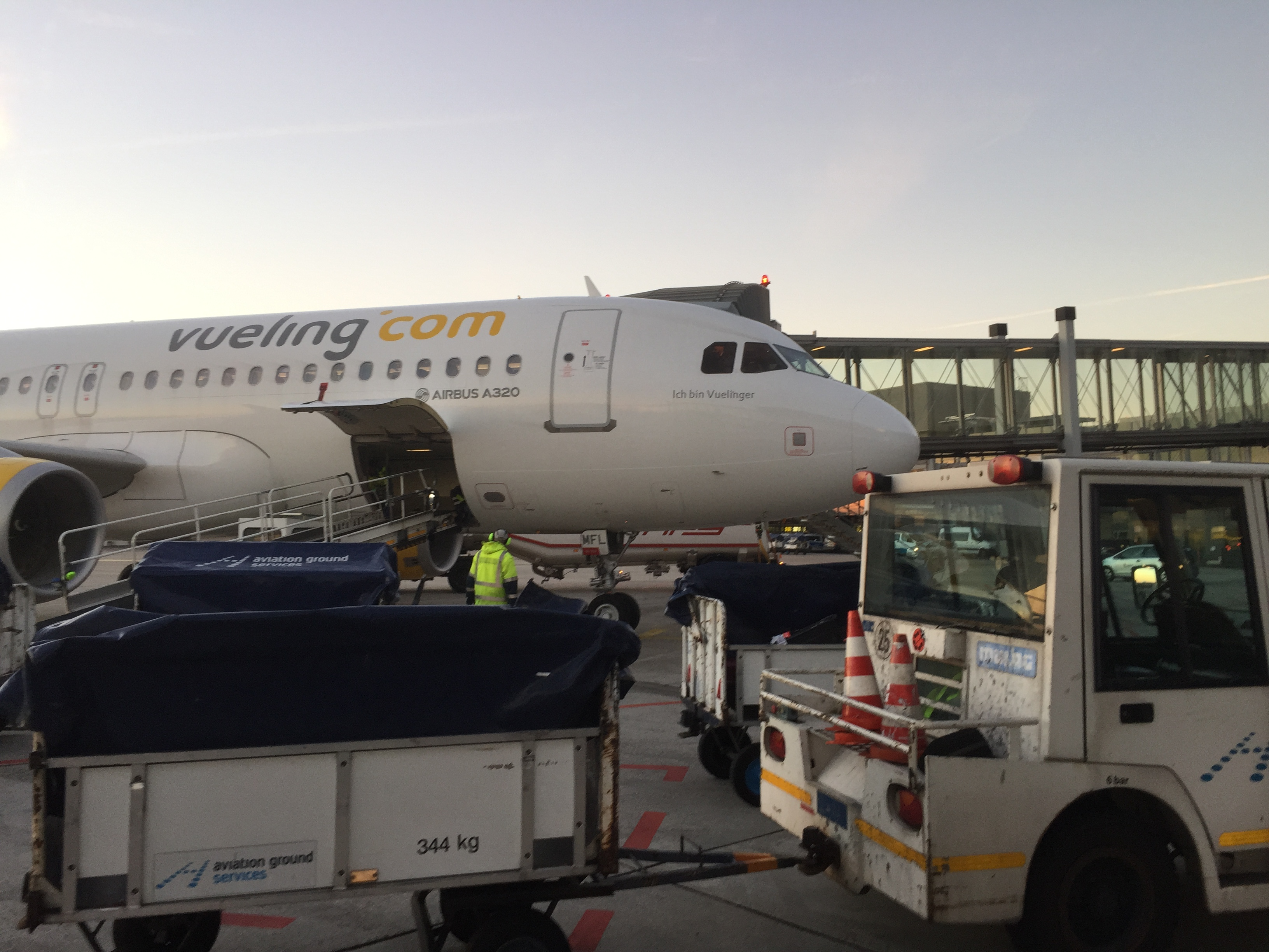 Vueling in HAJ